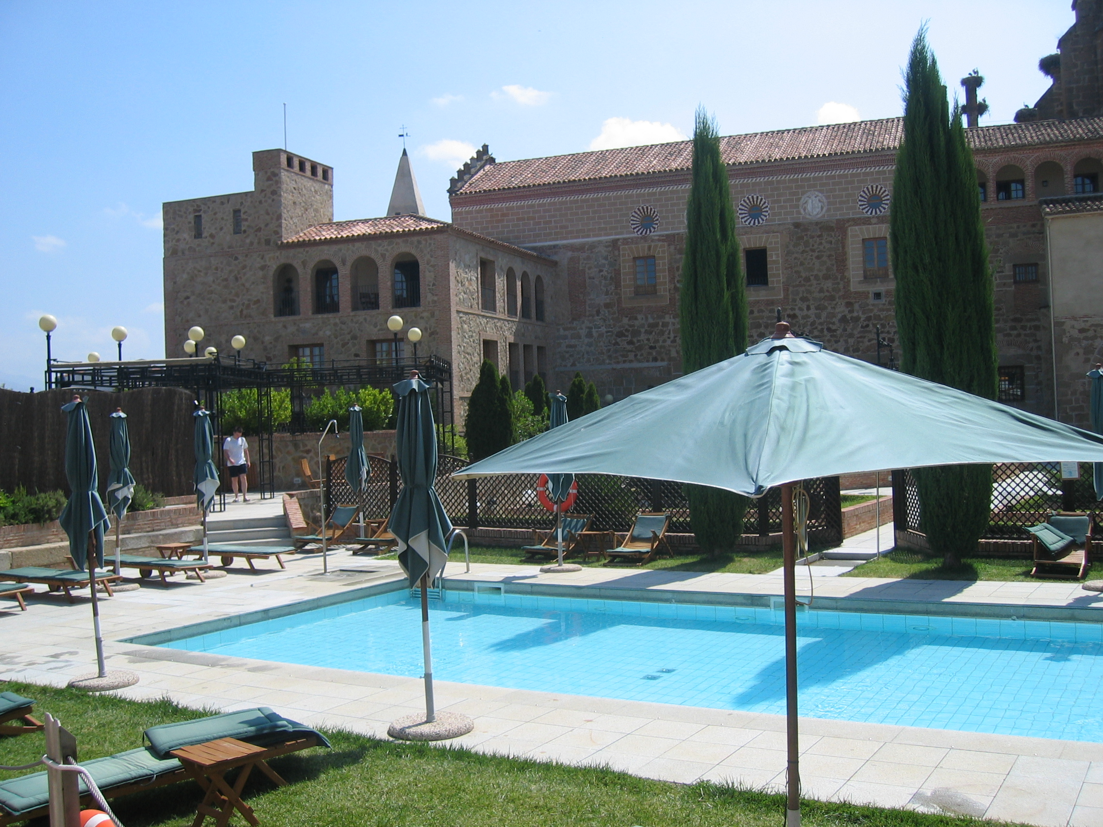 Garten und Pool des Paradors von Plasencia